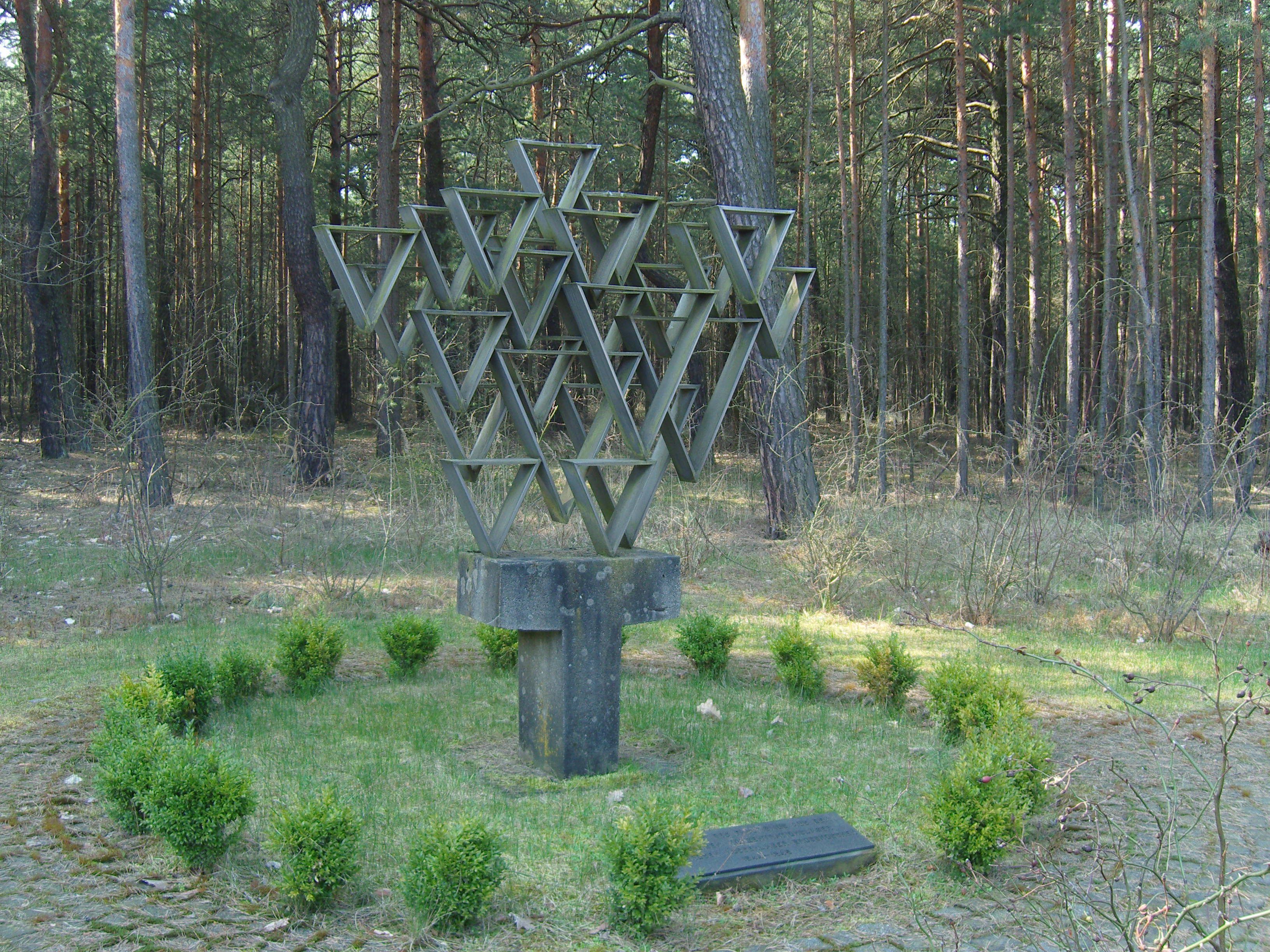 Denkmal für die Häftlinge im Außenlager des KZ Groß-Rosen in Großkoschen einem Ortsteil von Senftenberg, geschaffen von Ernst Sauer